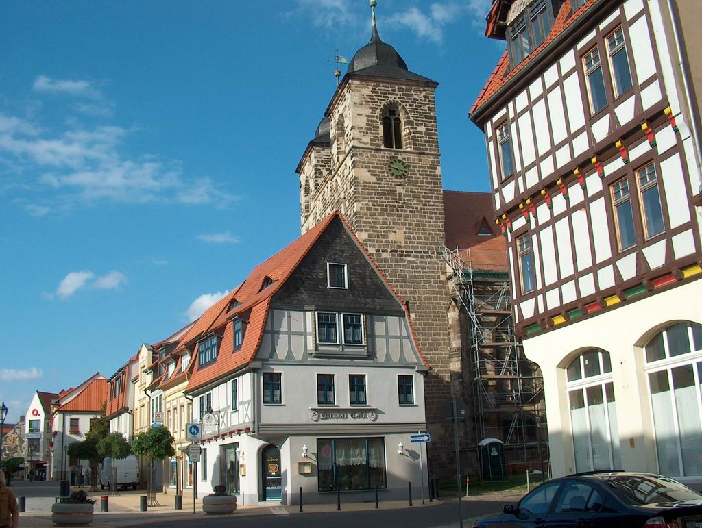 Innenstadt und Nicolaikirche in Oschersleben